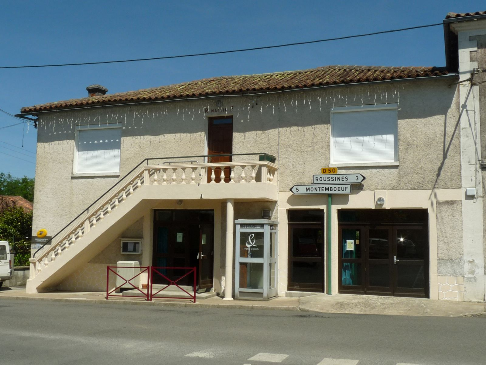 mairie du Lindois, Charente, France